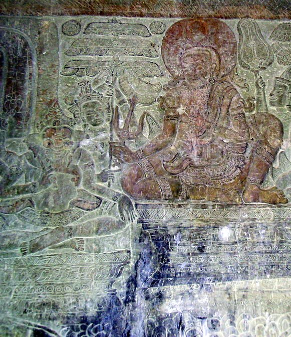 小吳哥, Vyasa narrating Ganesha, the Mahabharata